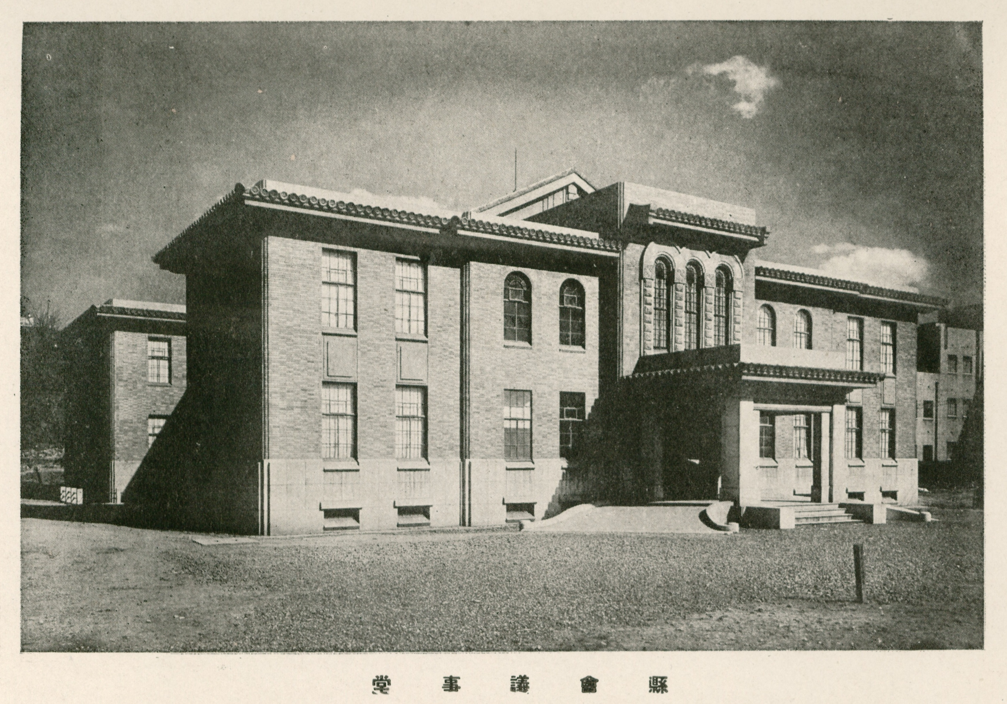 山梨県会議事堂外観